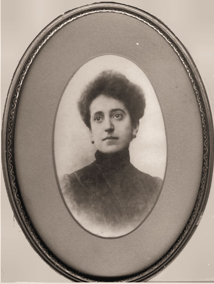 Retrato c. 1900 de Da. Laura de Iriondo Iturraspe, esposa de Miguel de Escalada Pujol.